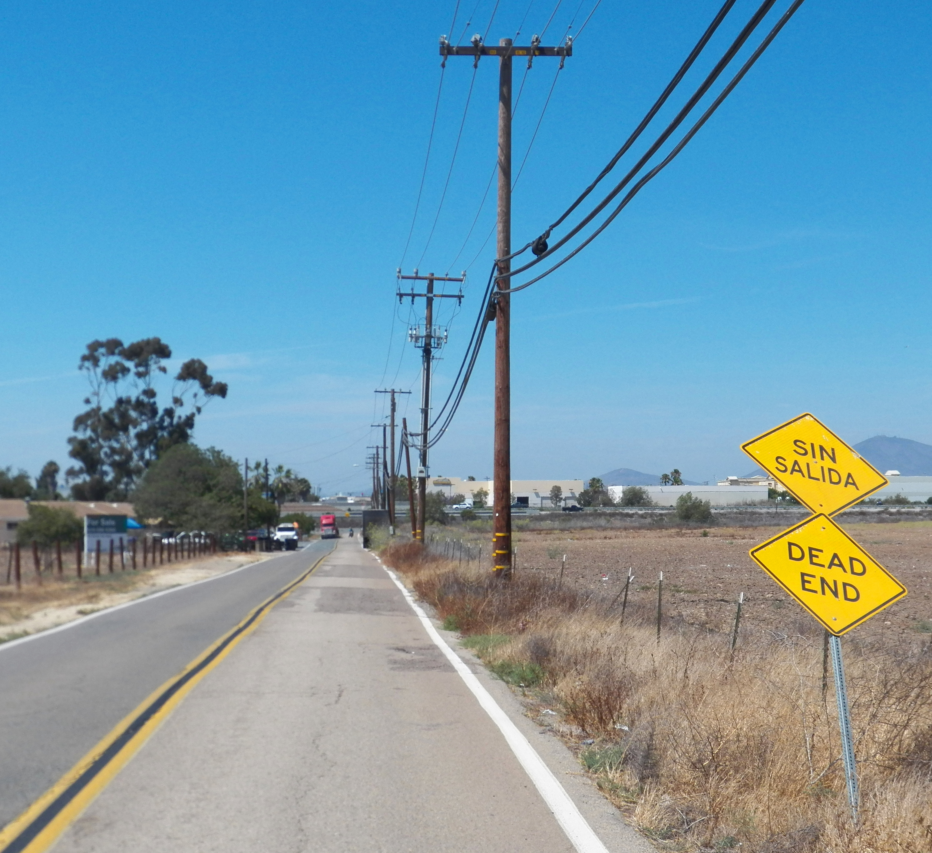 Dead end, Otay Mesa, San Diego.